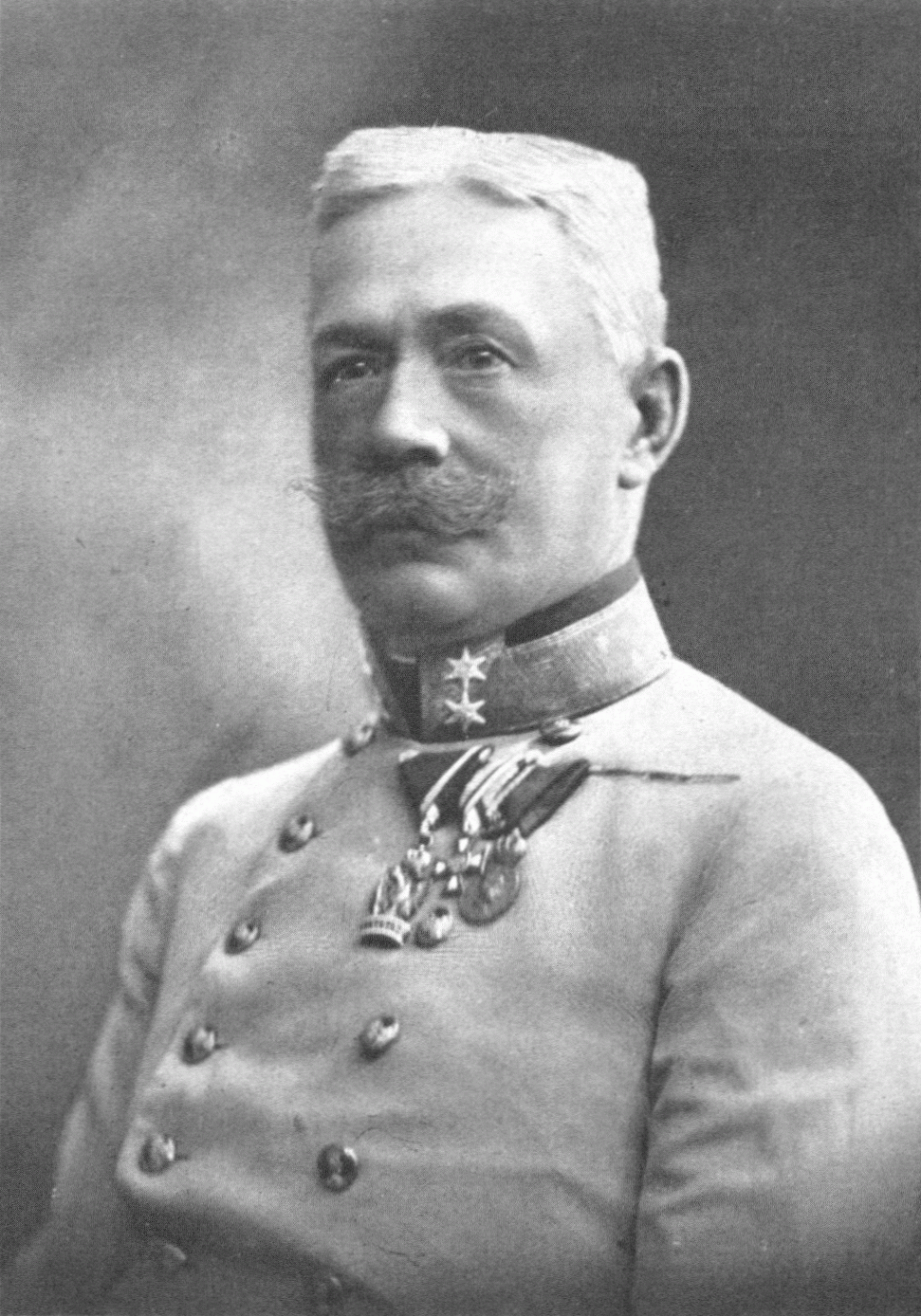 Leopold Freiherr von Hauer (1854-1933), Austrian-Hungarian general